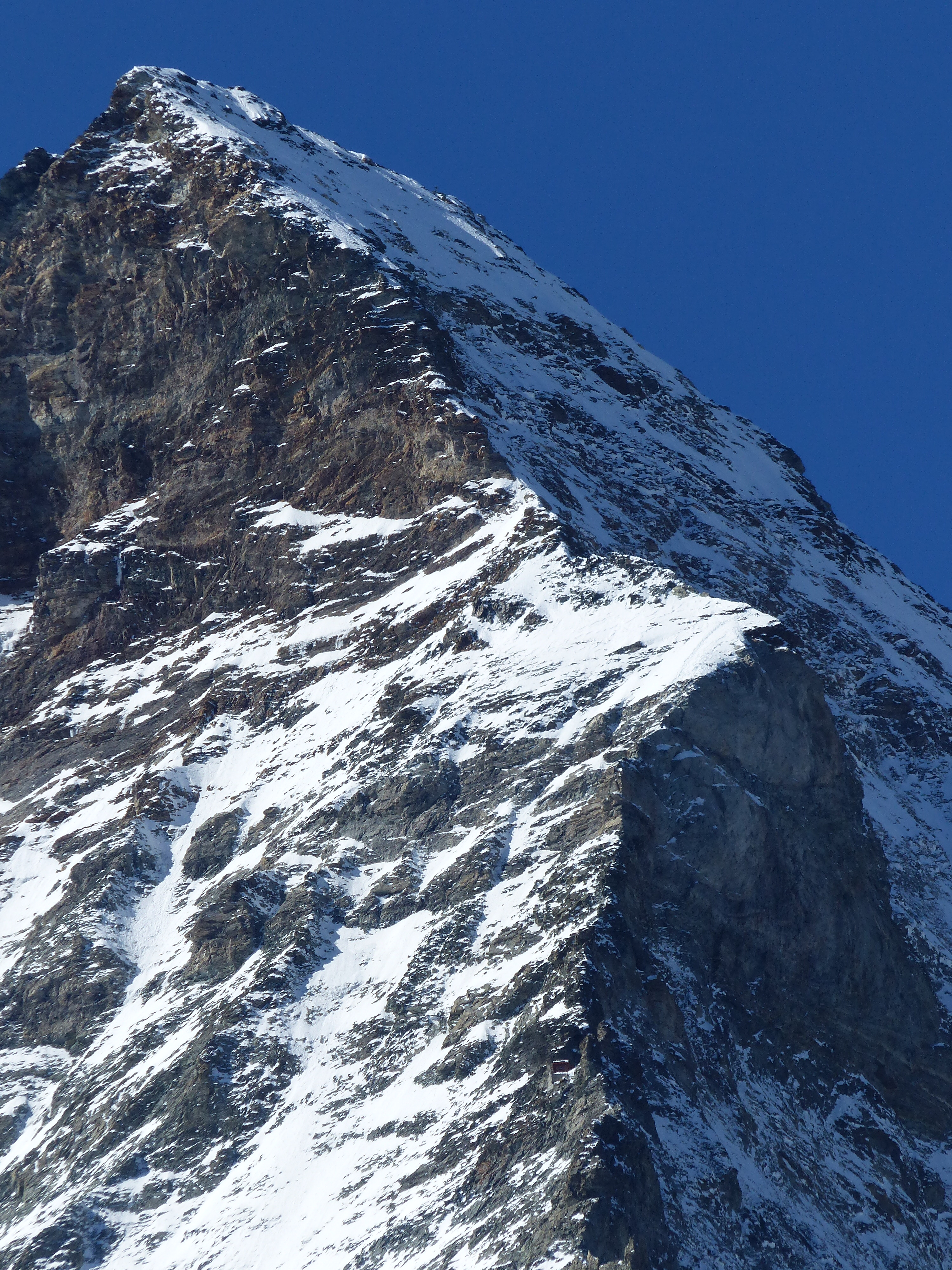 Hörnligrat des Matterhorns mit Solvayhütte